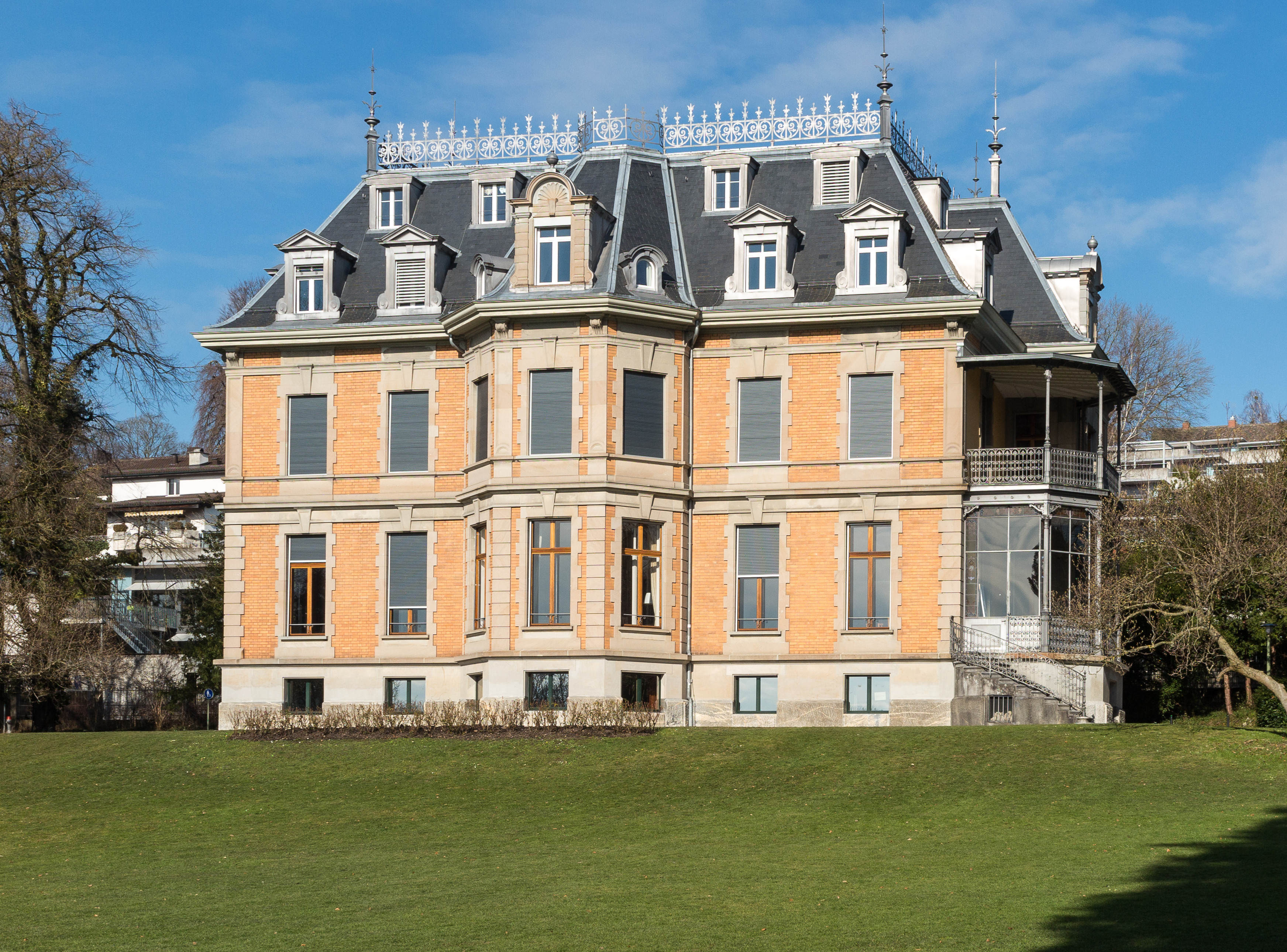 Villa Rychenberg, Rychenbergstrasse 94 in Winterthur, Sitz von Musikschule und Konservatorium